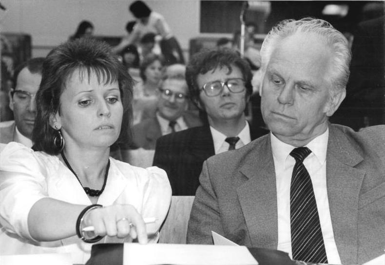 ADN-Peer Grimm 28.6.1990 Berlin: 18. VK-Tagung Die Abgeordneten debattierten weitere Gesetze und Verordnungen, die mit dem Inkrafttreten der Währungs,- Wirtschafts- und Sozialunion verbunden sind. Hier im Gespräch Dr. Günther Maleuda (DBD) und Karin Bencze, die einzige Vertreterin des DFD in der Volkskammer.